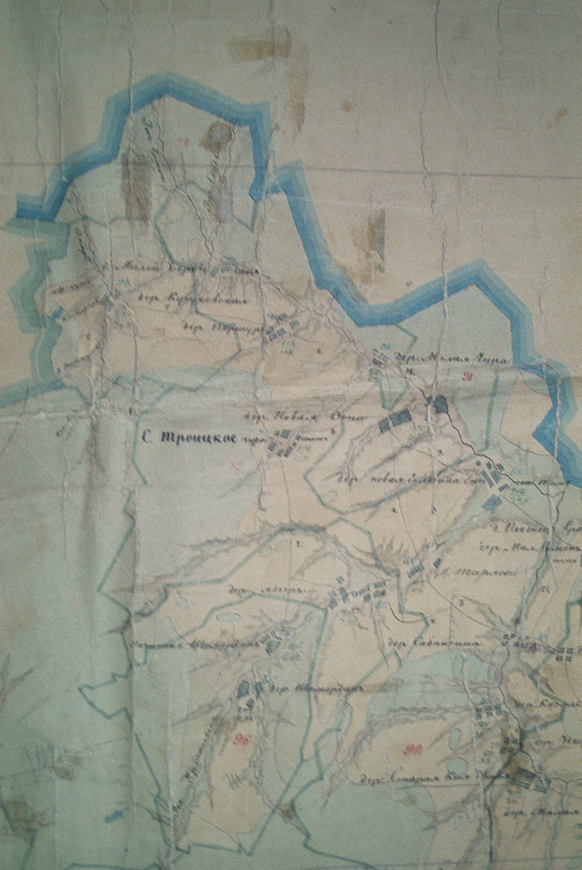 Татарча/tatarça: Бөрбаш Сәрдегәне һәм Бөрбаш авылларының борынгы картасы